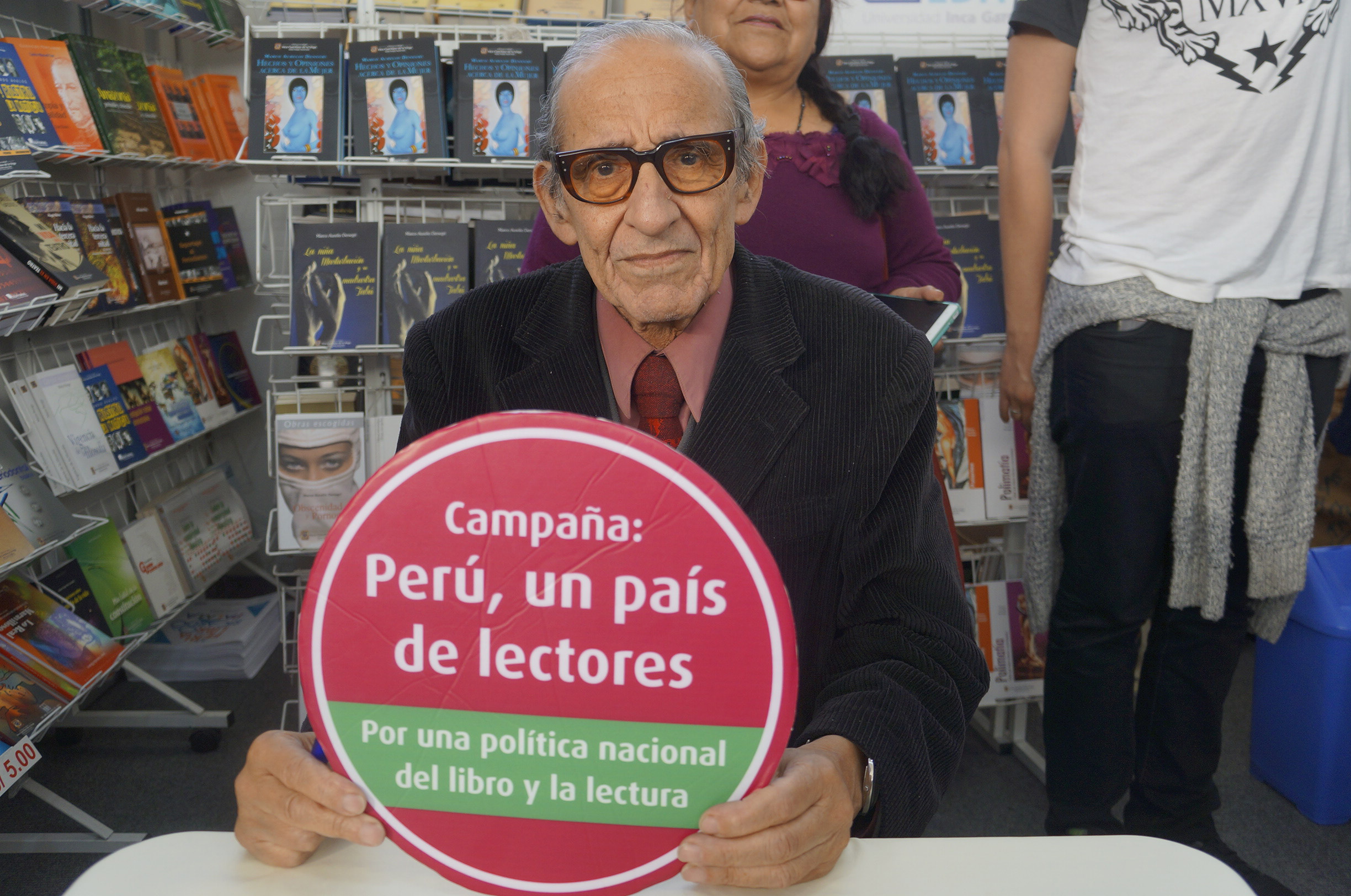 Marco Aurelio Denegri en la Feria del Libro de Ricardo Palma.